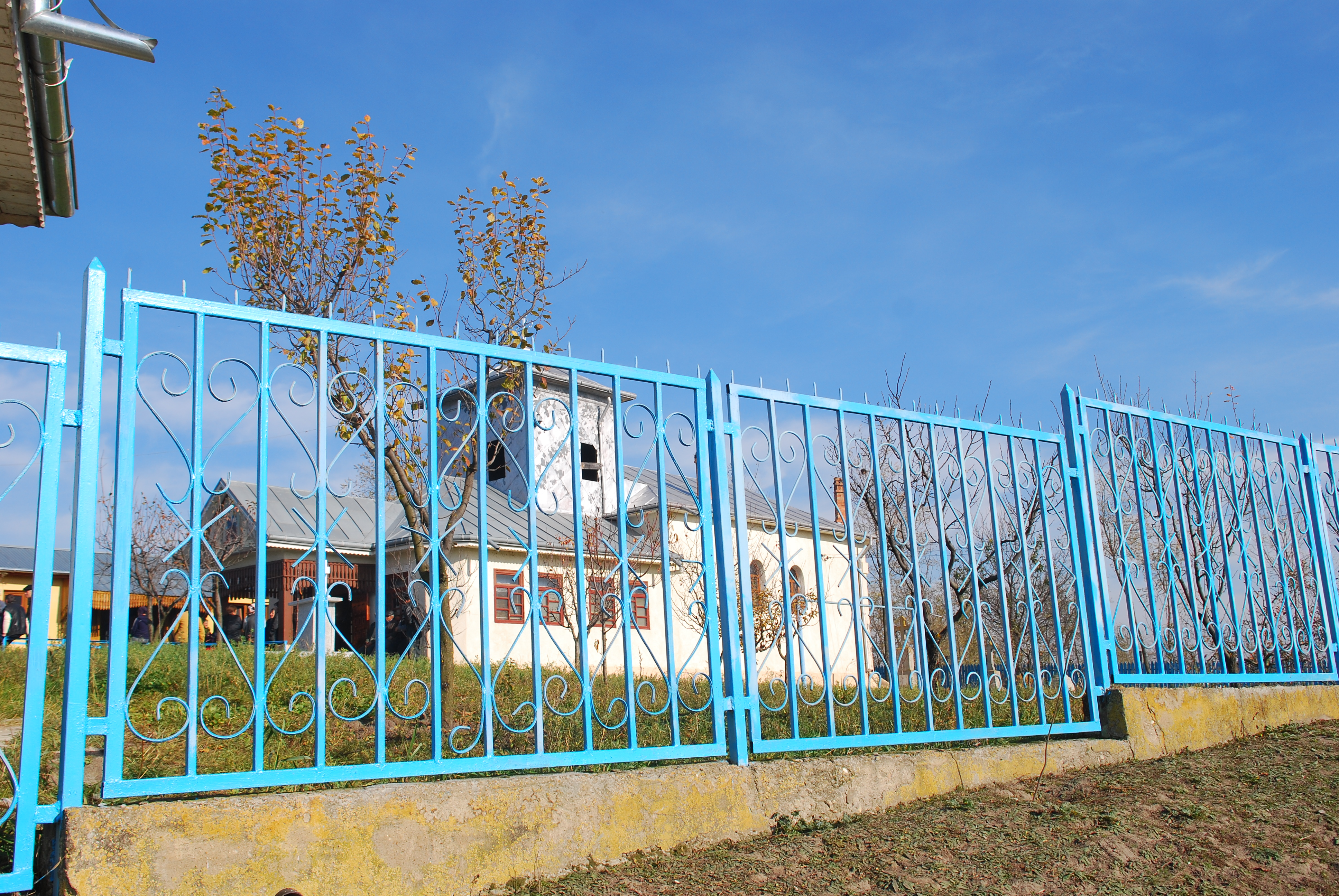 Biserica "Sf. Haralambie"